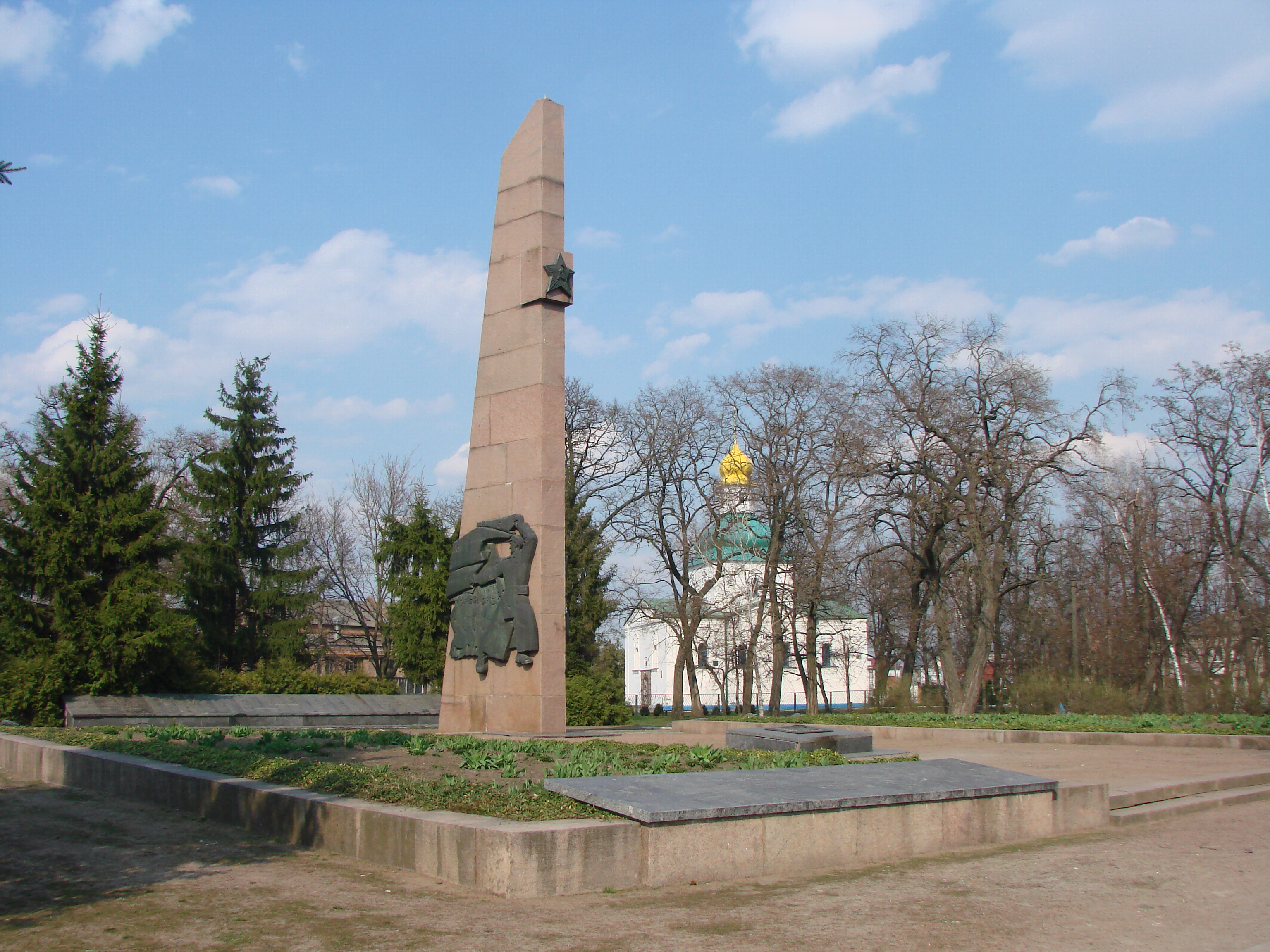 Меморіальний комплекс пам’ятників періоду громадянськиої і Великої Вітчизняної воєн:, Пирятин, пл. Борців Революції